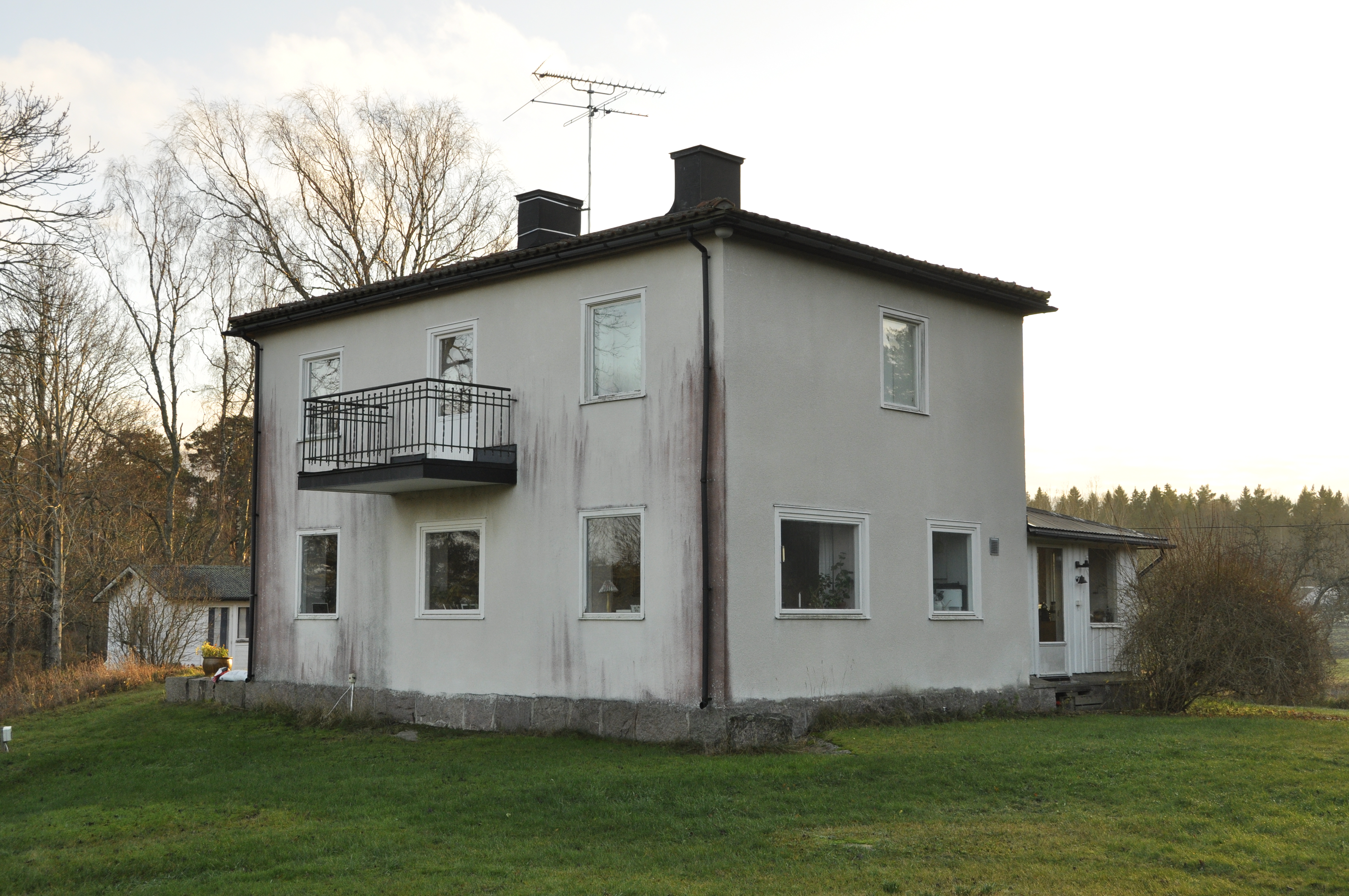 F.d orangeriet i Kårboda, Ljusterö, efter ombyggnad på femtiotalet